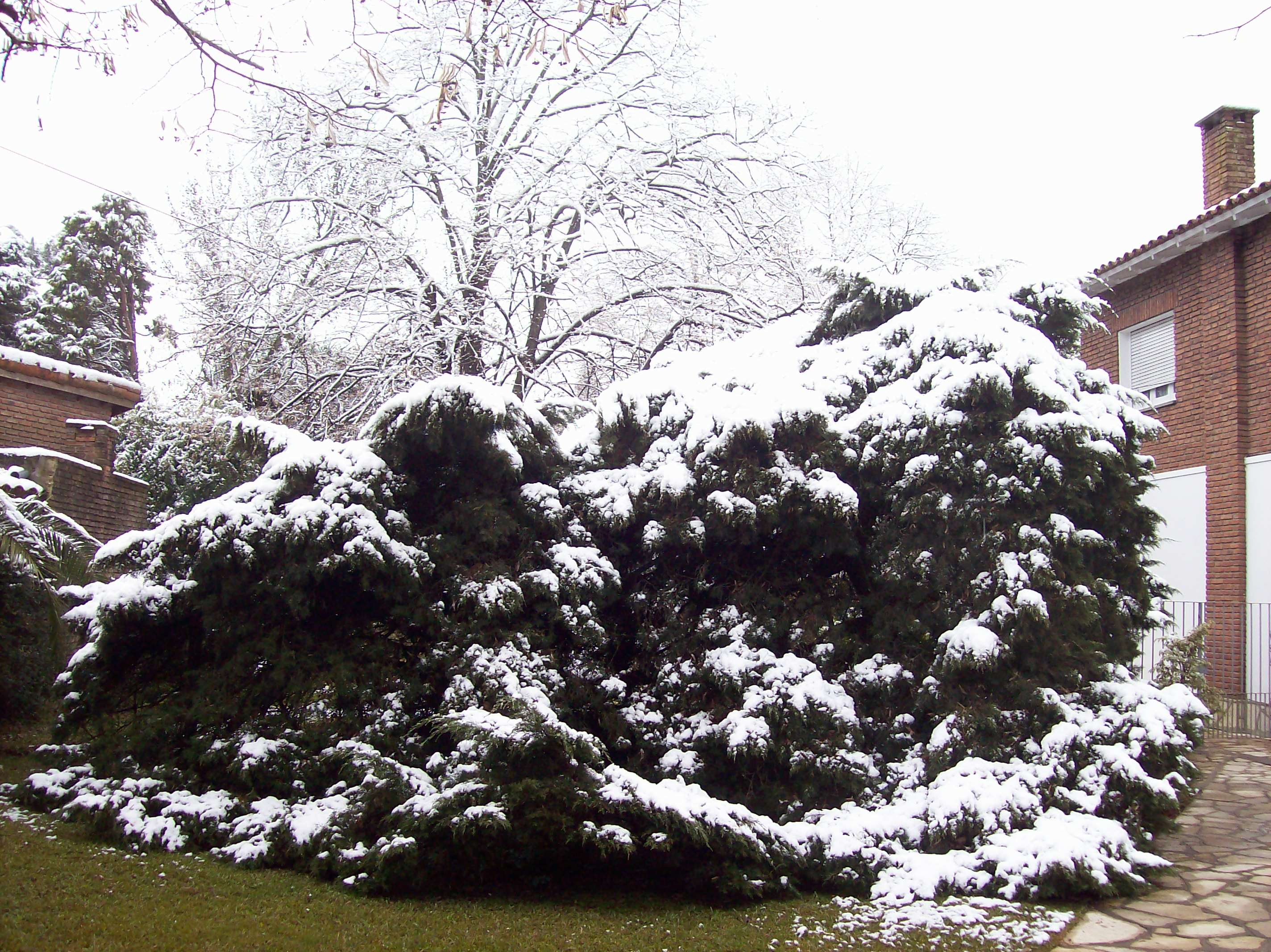 Nieve en Ranelagh. Fotografía sacada el 9/7/2007